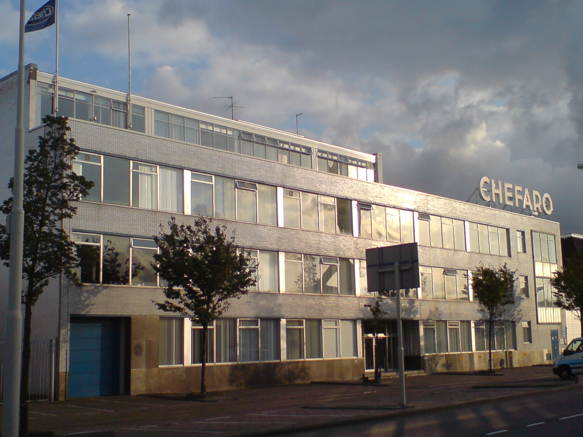 Chefaro (oftewel: Chemische fabriek Rotterdam) is een Nederlands farmaceutisch bedrijf met zijn belangrijkste vestiging in Rotterdam. Gebouw aan de Keileweg.